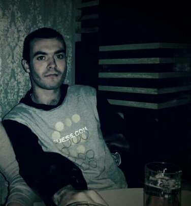 Gegë: Bojkka